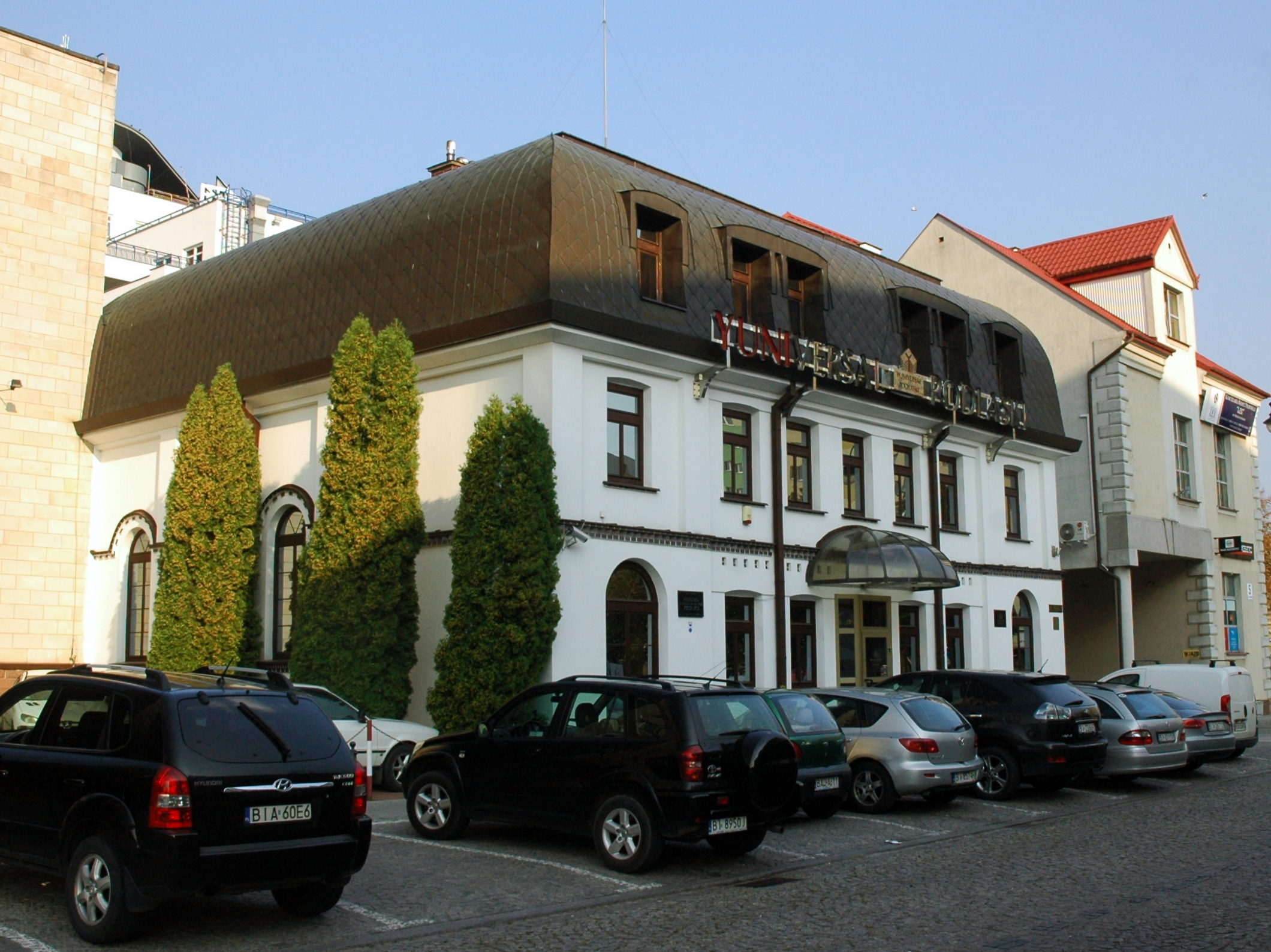 Synagoga Piaskower w Białymstoku